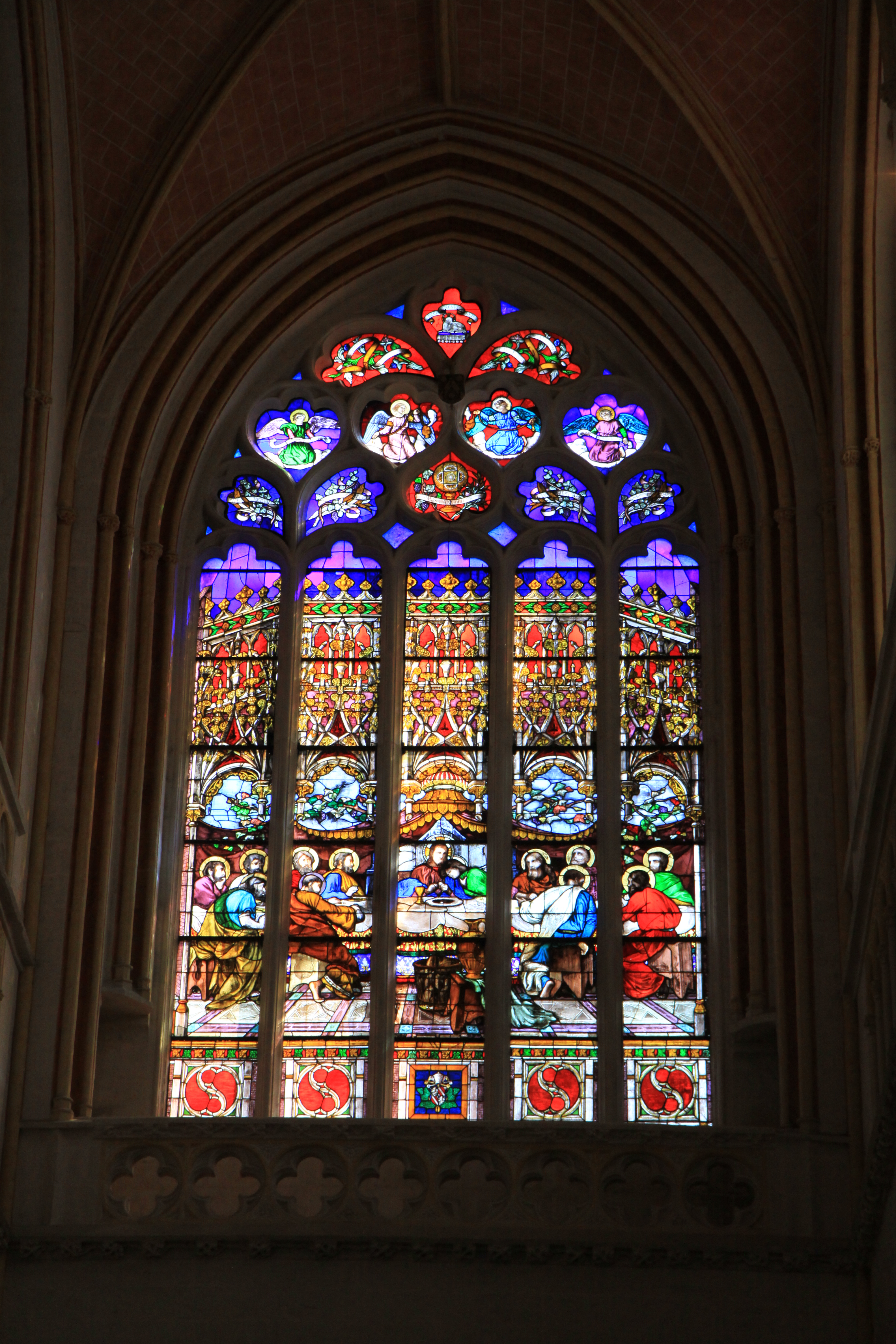 La Cène. Maîtresse-vitre (baie 118) du transept sud de la cathédrale Saint-Corentin de Quimper (29). Armes de Pie IX.